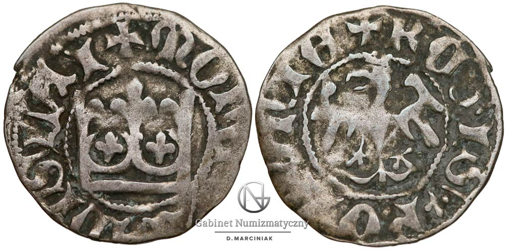 Półgrosz koronny Władysław Jagiełło bez znaków